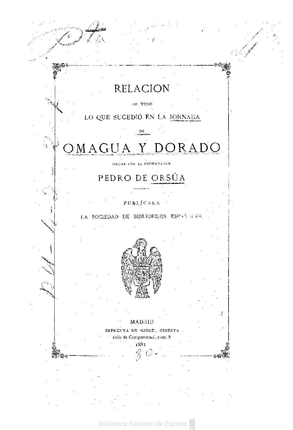 Relación de todo lo que sucedió en la jornada de Omagua y Dorado, hecha por el Gobernador Pedro de Orsúa Autor: Vázquez, Francisco (fl. 1559) Fecha: 1881 Datos de edición: Madrid Sociedad de Bibliófilos Españoles